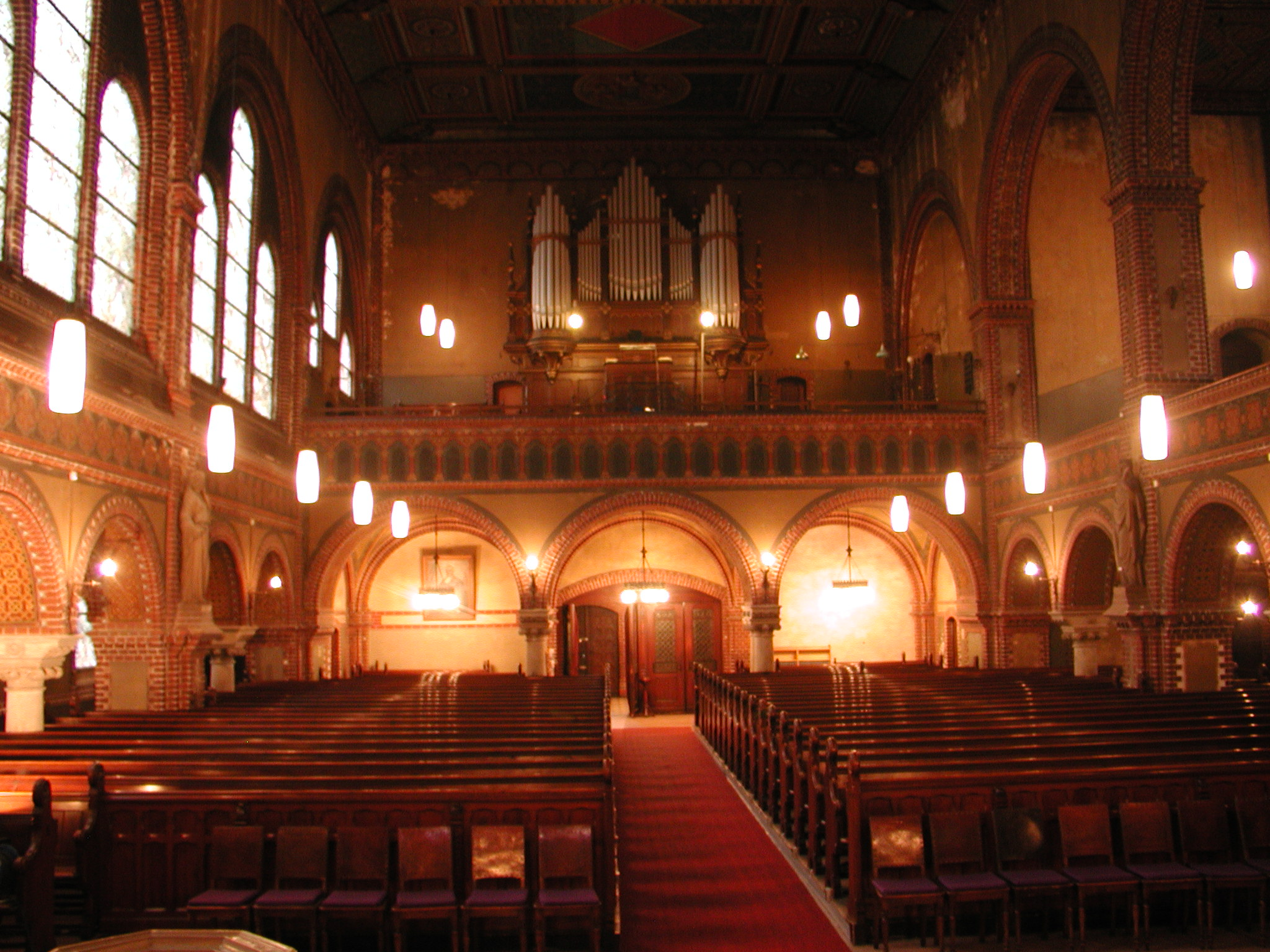 Blick in das Hauptschiff der Immanuelkirche